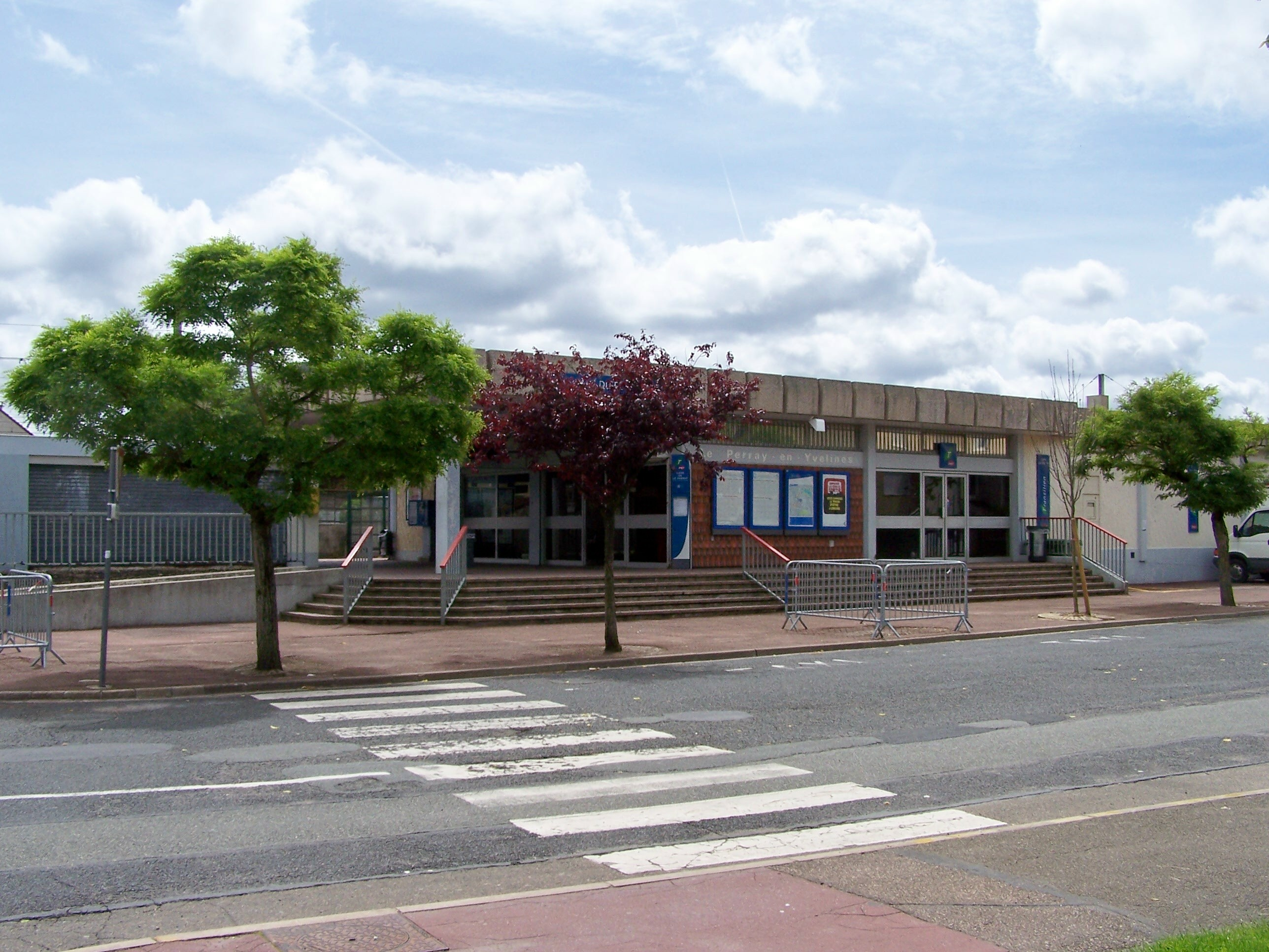 Gare du Perray-en-Yvelines, Yvelines, France